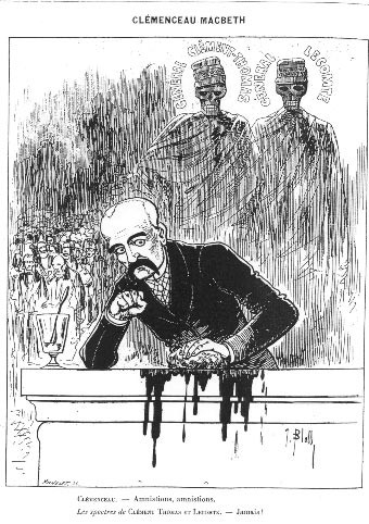 Clemenceau Macbeth, caricature de Georges Clemenceau réclamant l'amnistie des communards à la Chambre des députés tandis que les spectres désapprobateurs des généraux Claude Lecomte et Jacques Léonard Clément-Thomas se dressent derrière lui.